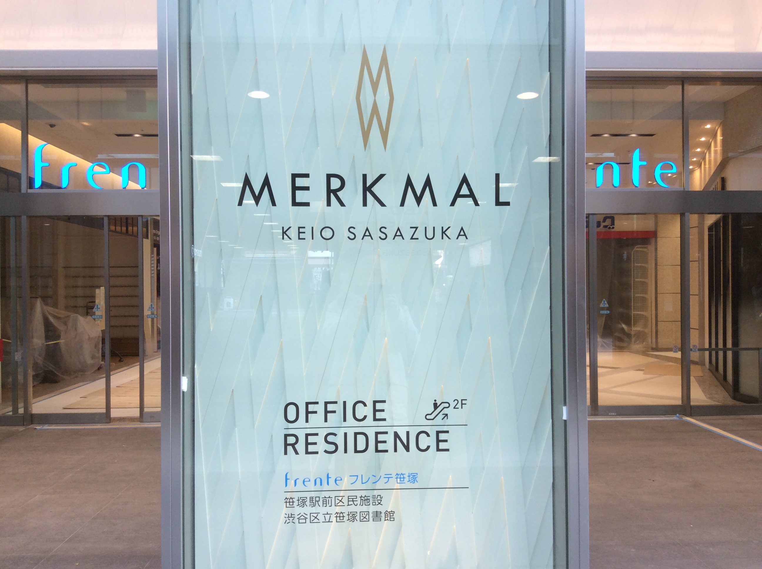 （2015年3月撮影）